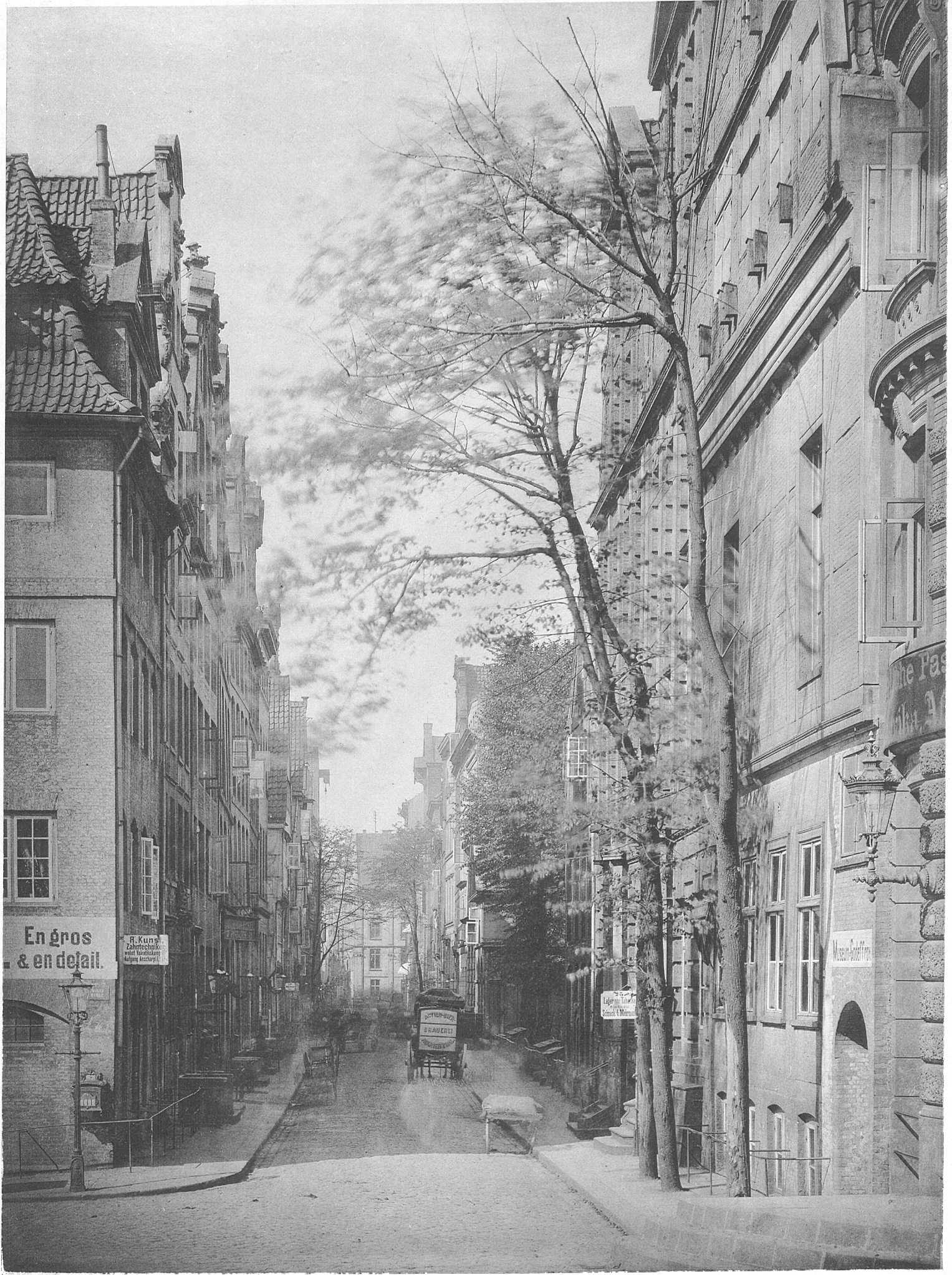 Alter Wandrahm, 1883; vorne rechts Museum Godeffroy, Alter Wandrahm 26